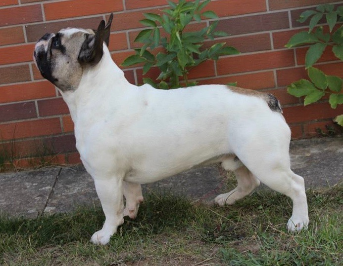 Joker Sparky reinkarnacja Poland FCI